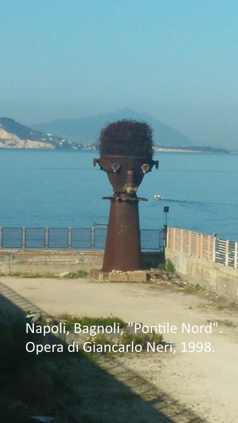 Statua vicino al Pontile Nord di Bagnoli, Napoli. Creata da Giarncarlo Neri nel 1998 con pezzi presi dall'Italsider, storico stabilimento siderurgico della zona, in fase di demolizione.